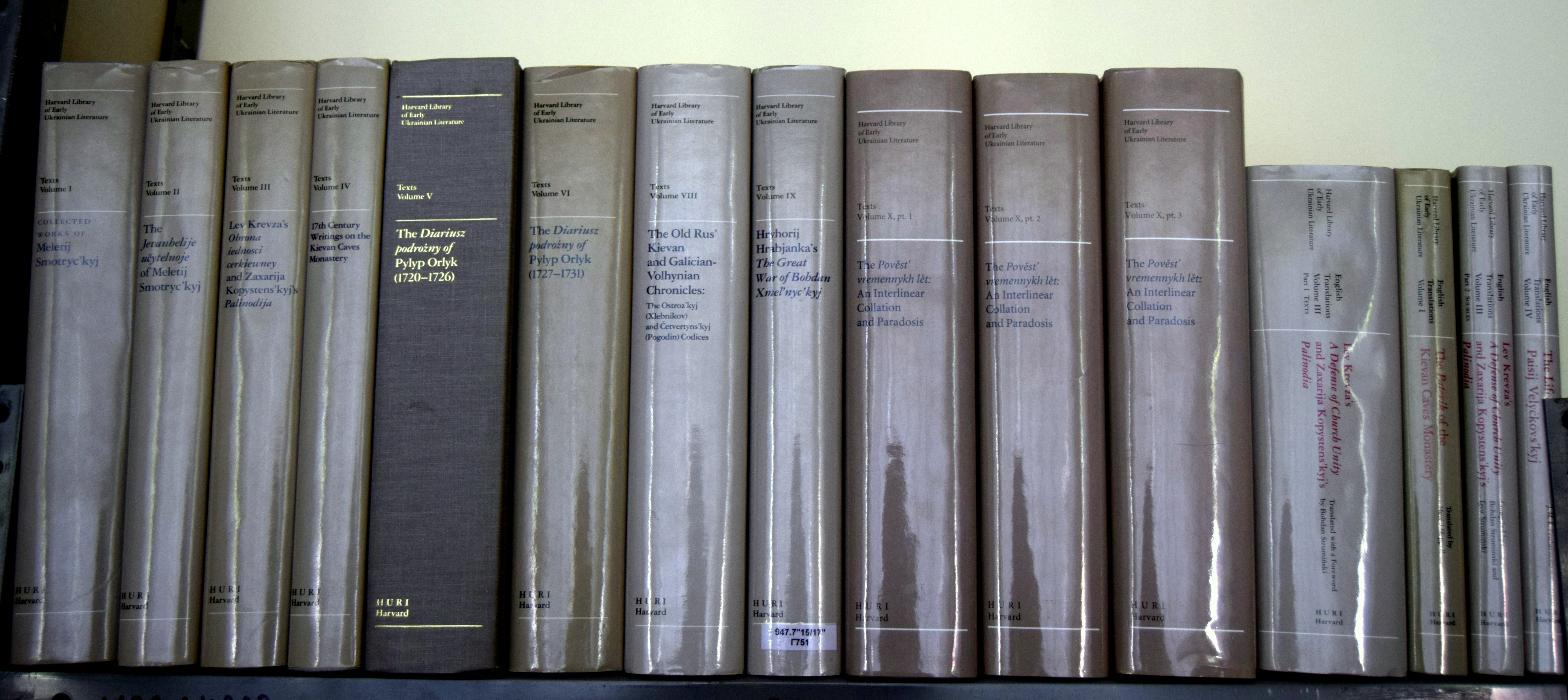 Books from Harvard Library of Early Ukrainian Literature series